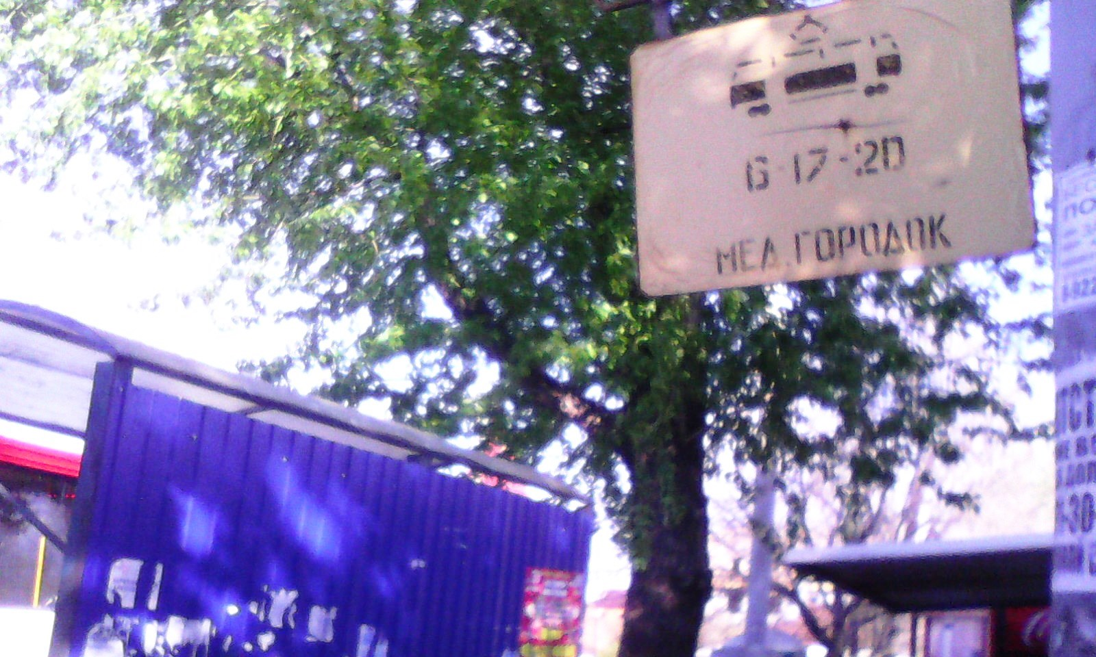 Трамвайная конечная остановка "Медгородок" в городе Челябинске по ул. Блюхера напротив Челябинской областной больницы.